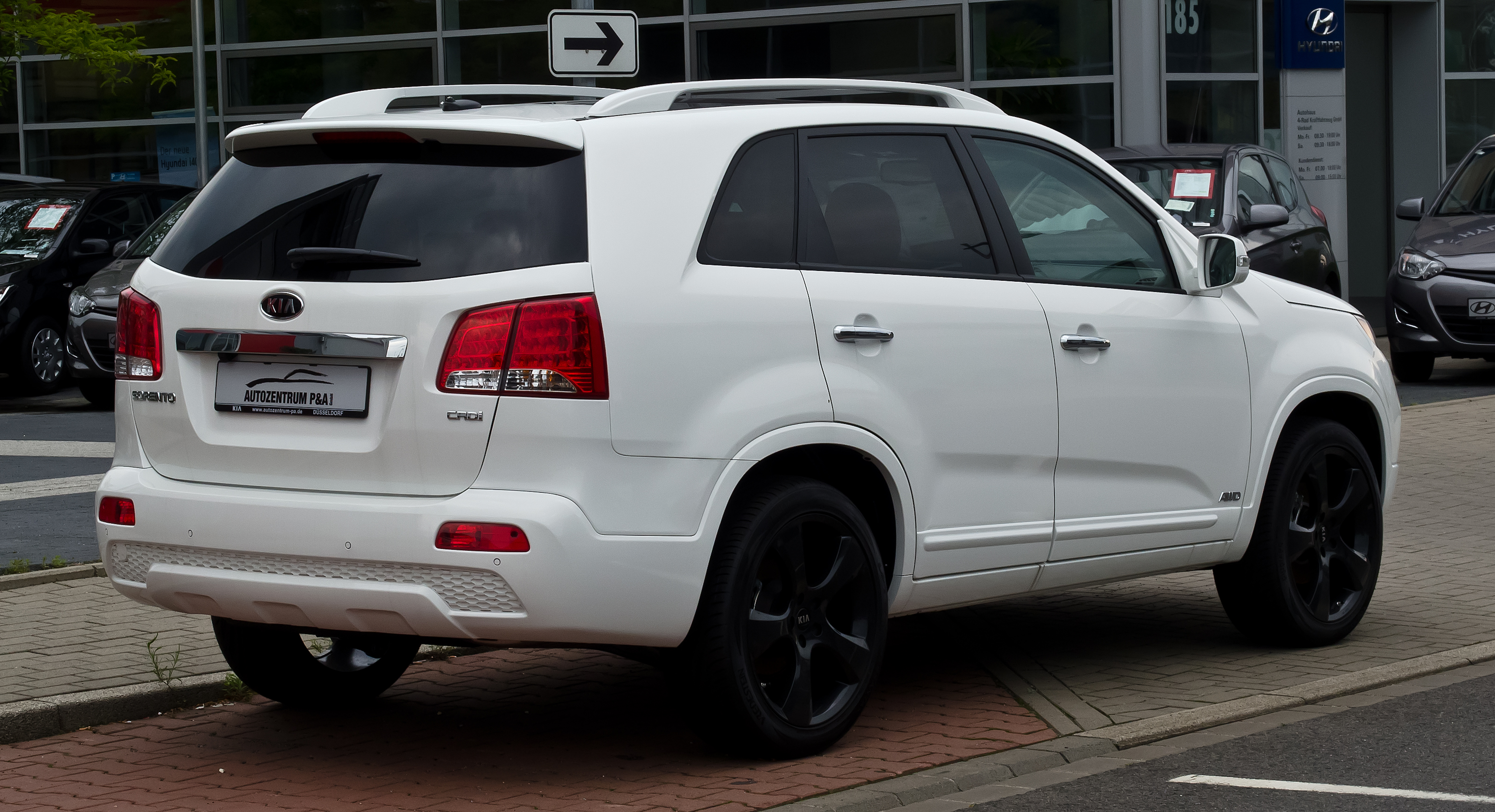 Kia Sorento 2.2 CRDi AWD Spirit (XM)